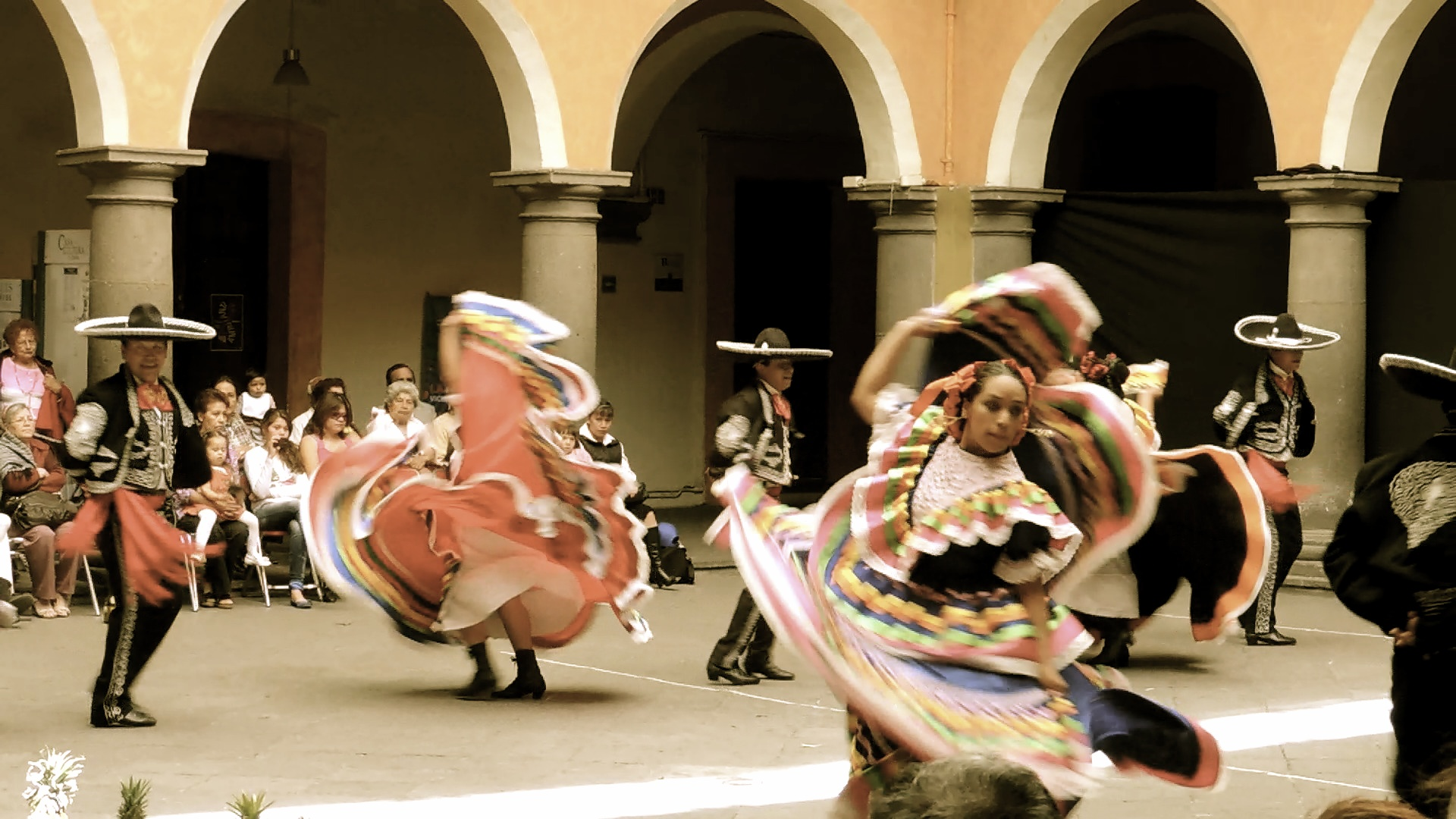 Casa de la Cultura